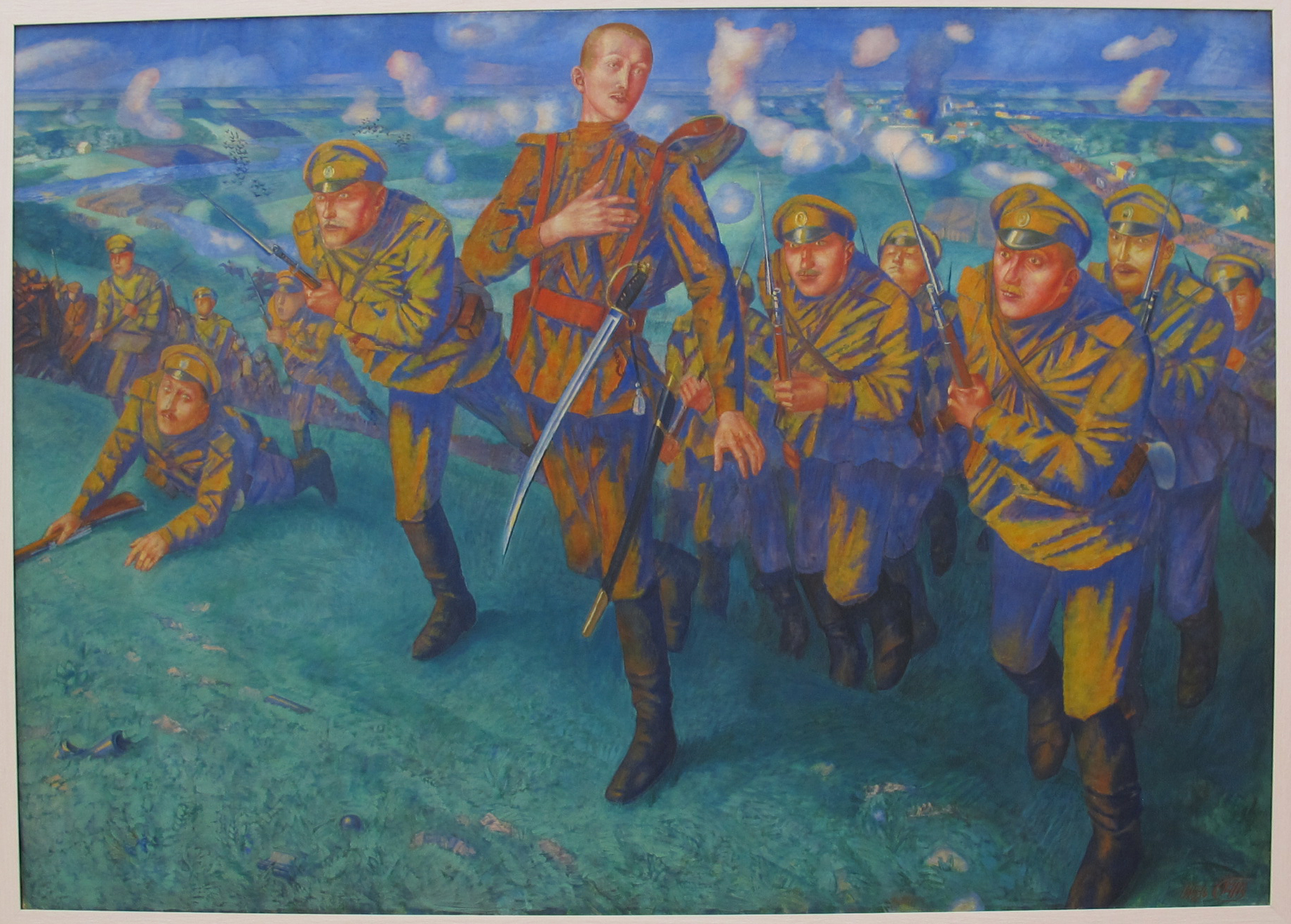 Kuzma petrov-vodkin, sulla linea di fuoco, 1916